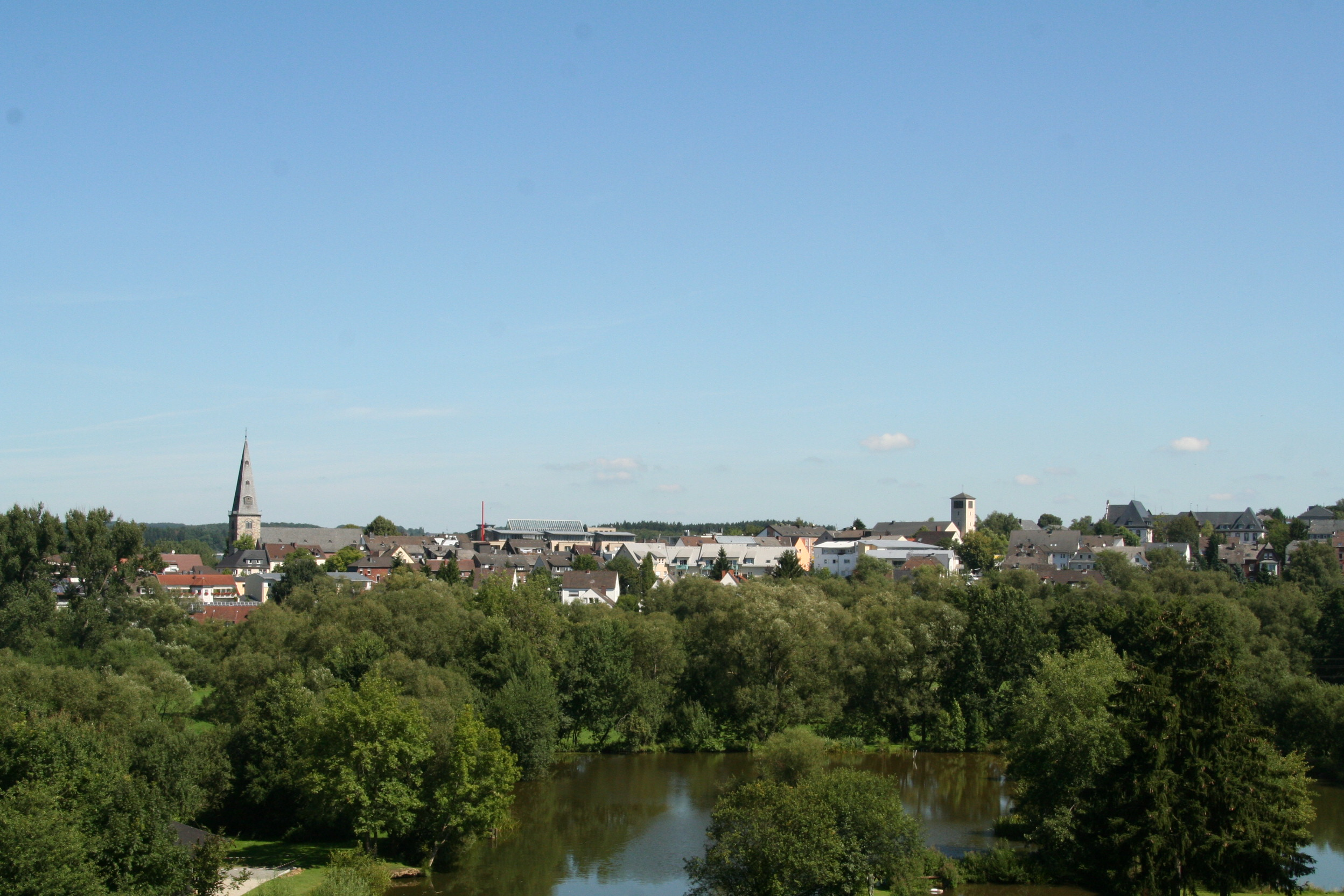 Altenkirchen (Westerwald), Stadtansicht